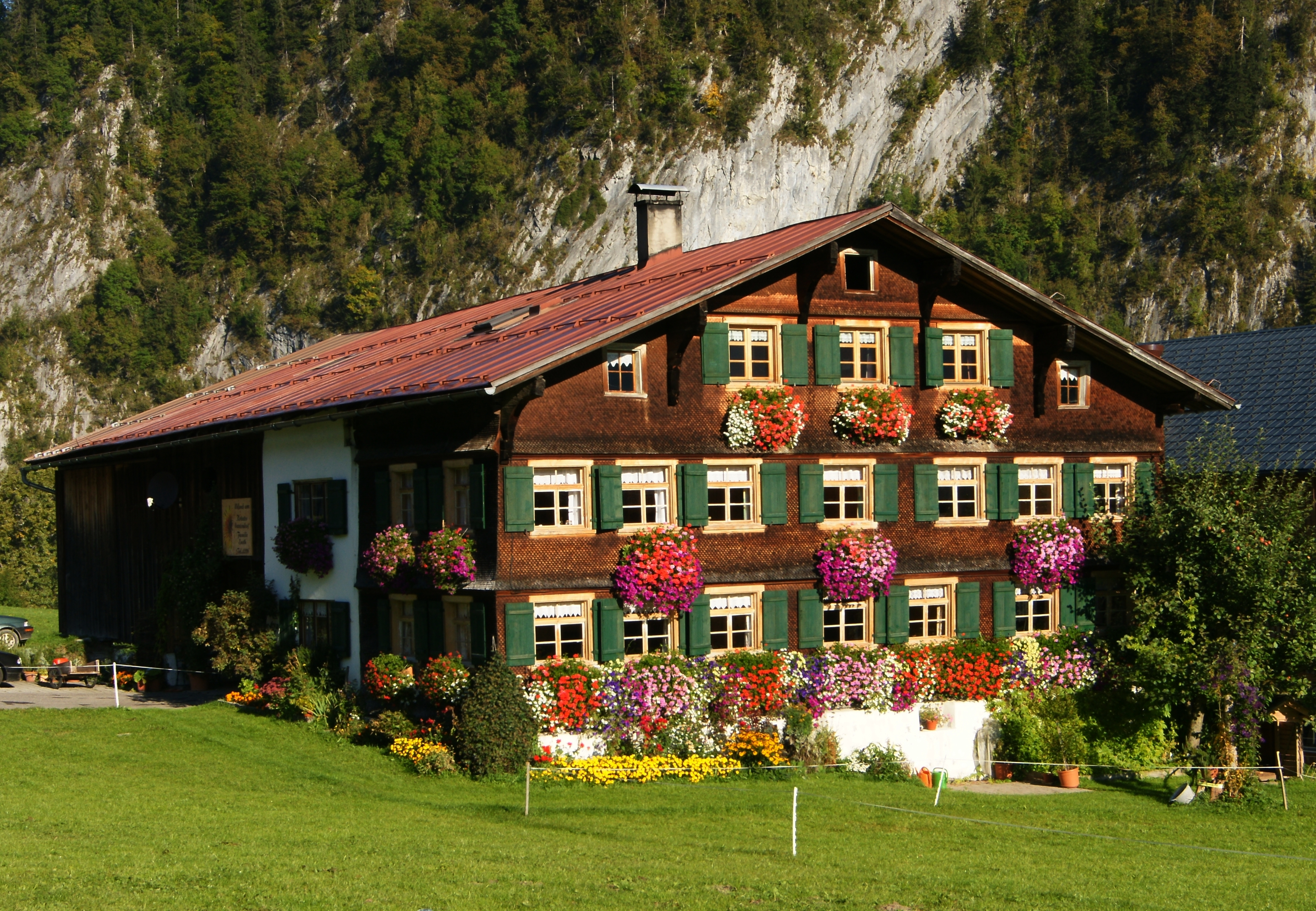 Fassade, Blumenschmuck, Bauernhaus in Argenau Nr.116 Au (Vorarlberg) im Bregenzerwald. Info Das Objekt steht unter Denkmalschutz.